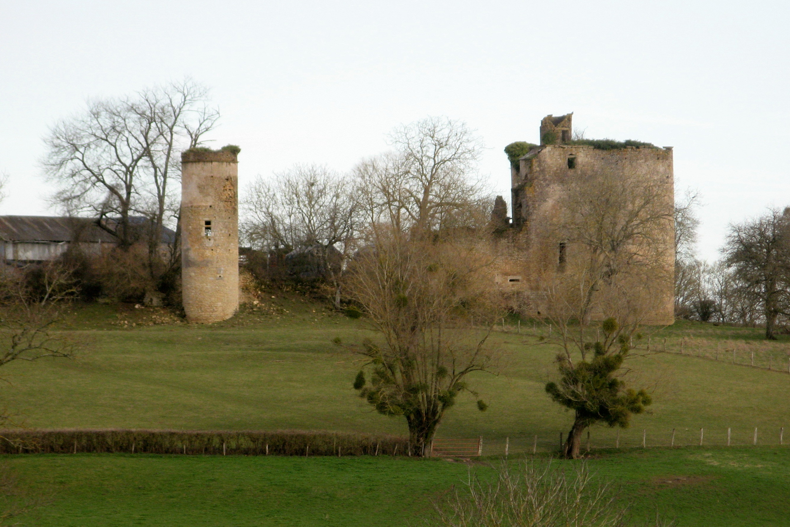 Frasnay-Reugny, château du Ravier